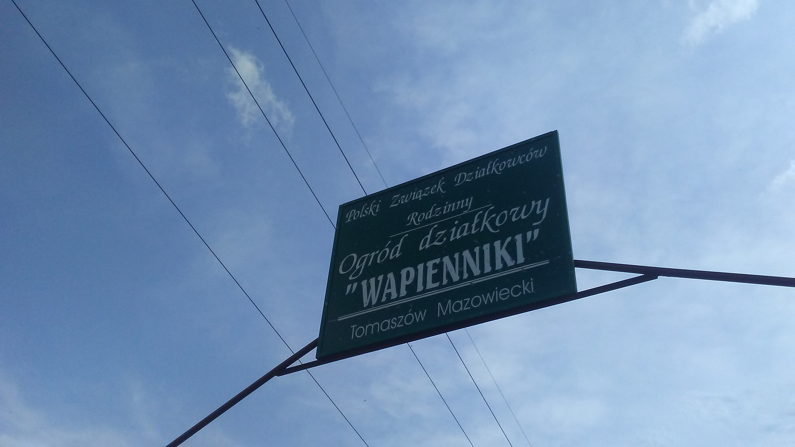 The allotment gardens ”Wapienniki” in Tomaszów Mazowiecki, signboard